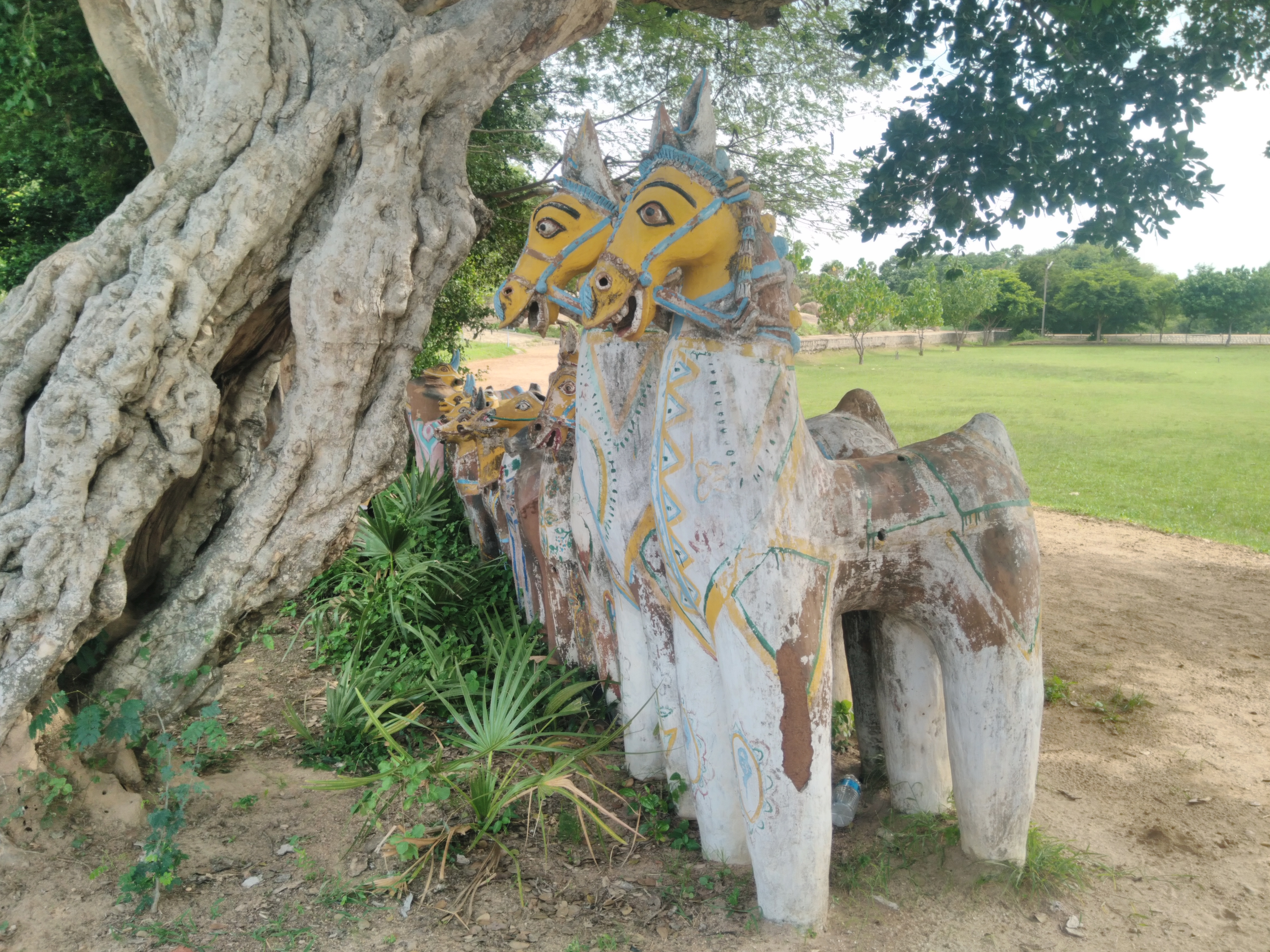 சித்தன்னவாசல் மலைக்கு அருகில் உள்ள கோயிலில் காணப்படும் சுடுமண் படிமம்